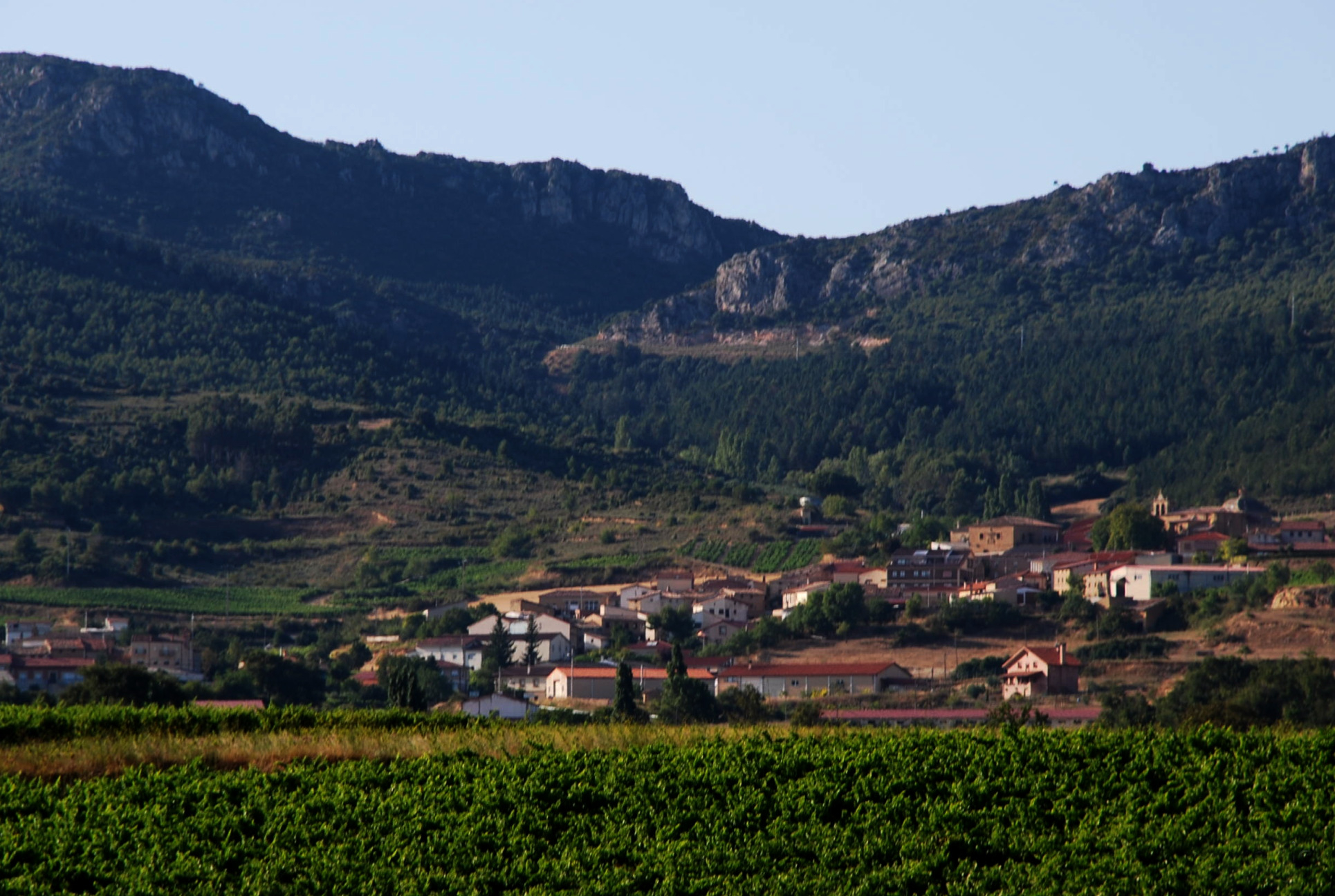 Panorámica de Villalba de Rioja